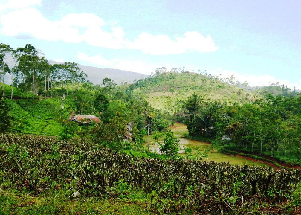 Mekarsari, Cipongkor, West Bandung Regency, West Java, Indonesia